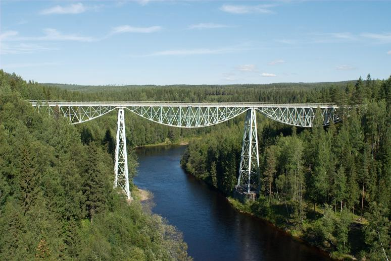 Första bron. Landsvägsbro. Byggdes 1891 och är en stålfackverksbro i fyra spann - alla olika långa - med hängande parabelfackverk och med en total spännvidd av 164 meter.; Bro; Byggnadsverk; Kommunikationsväsen